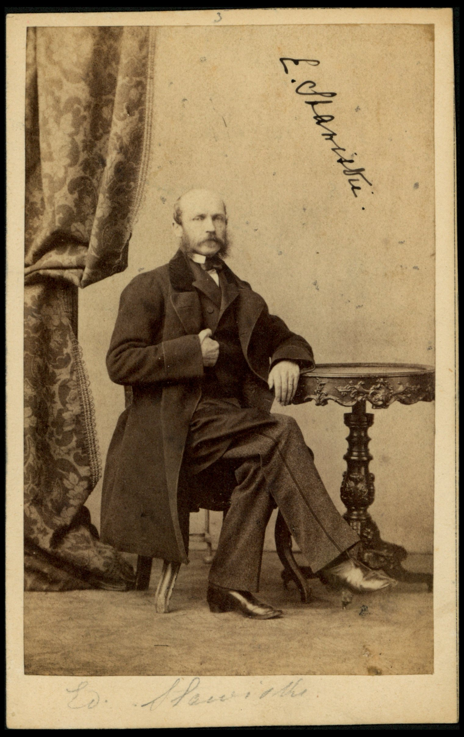 Edmund Stawiski, ok. 1863 r.